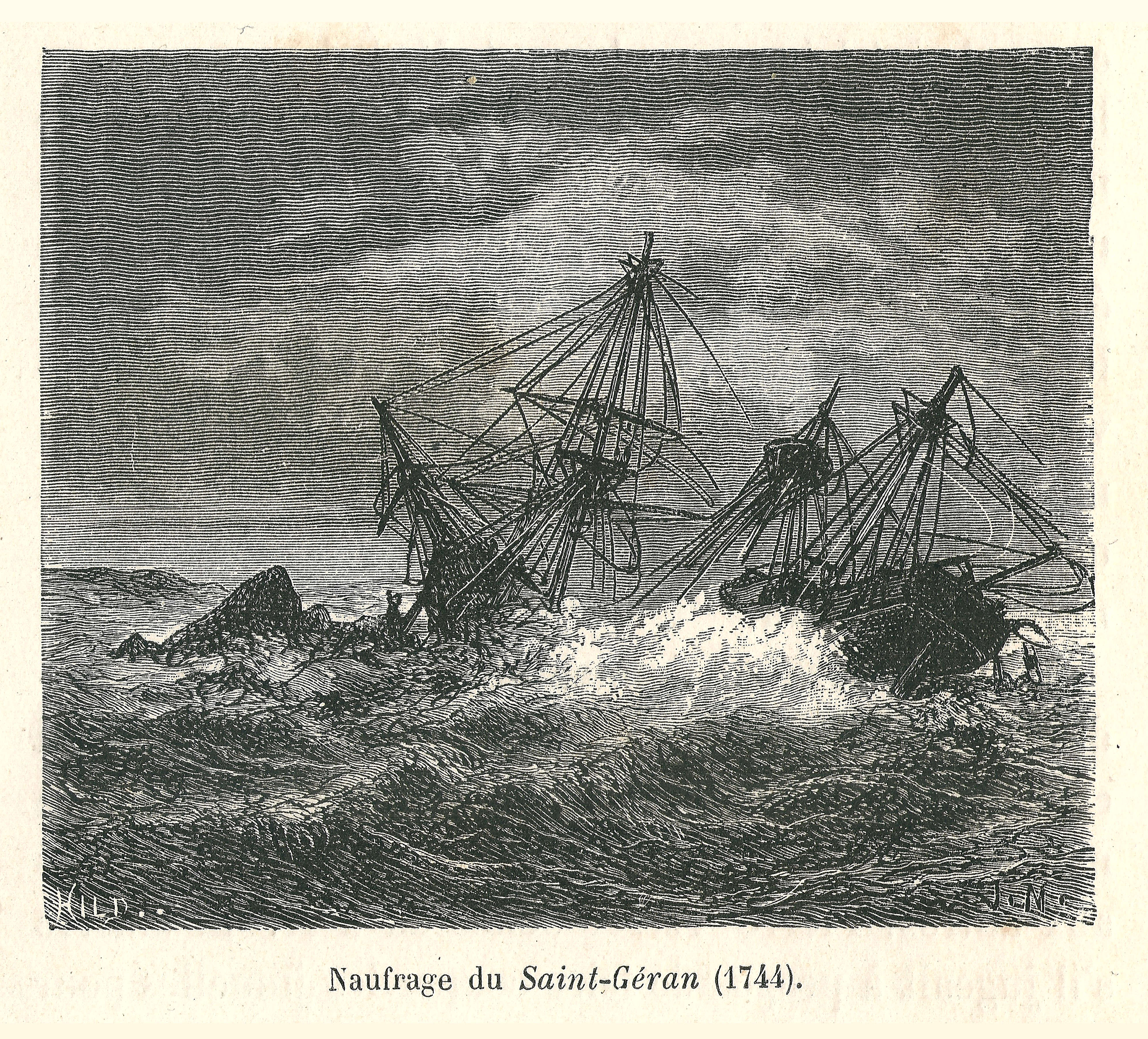 Gravure de Jules Noël tirée de : Zurcher & Margollé, Les Naufrages célèbres, Paris : Hachette, 3e édition, 1877 -- Naufrage du vaisseau de la Compagnie des Indes, le Saint-Géran, en vue de l'Île de France (aujourd'hui Île Maurice) en 1744